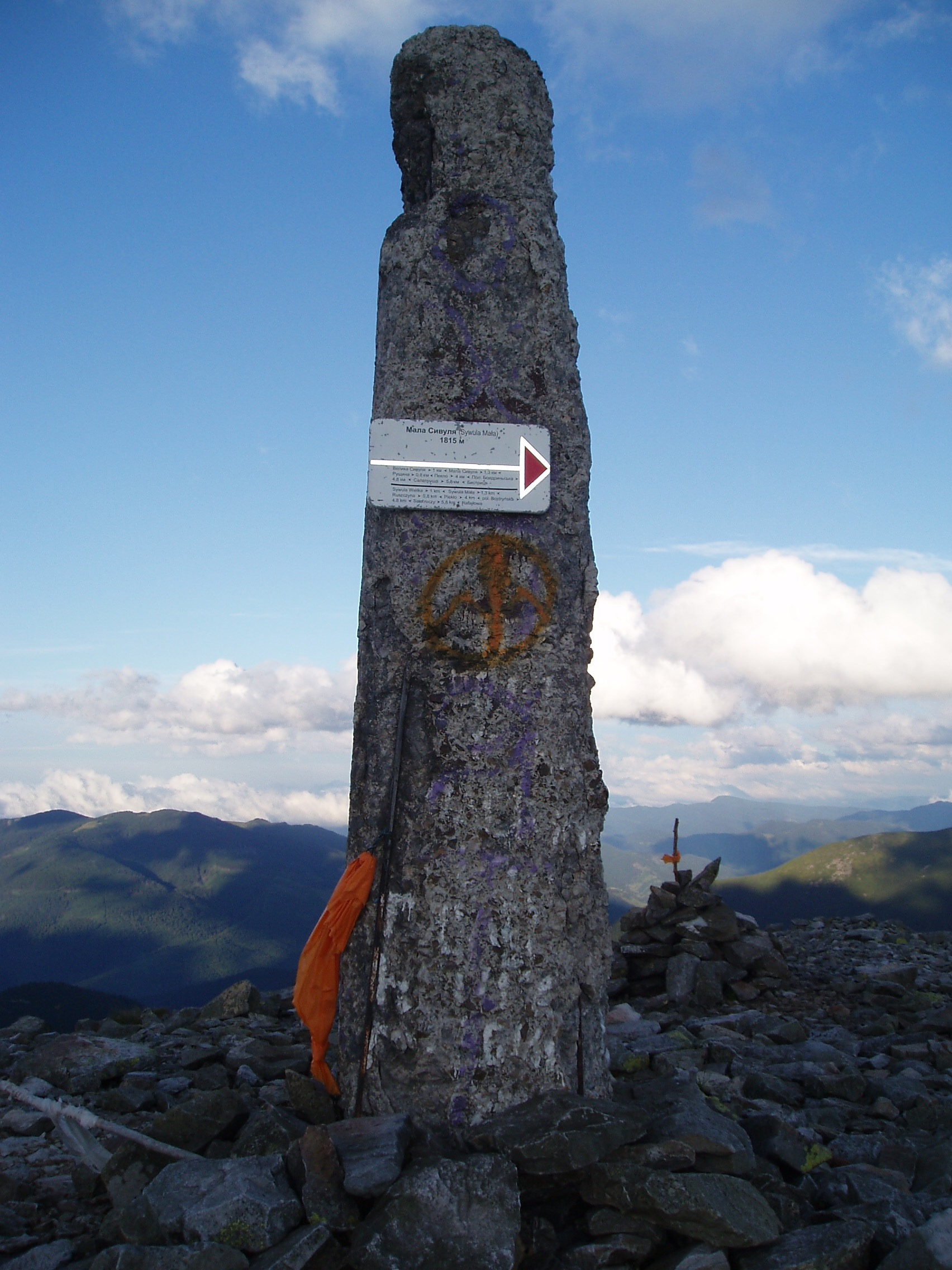 Вказівний стовп на Малій Сивулі